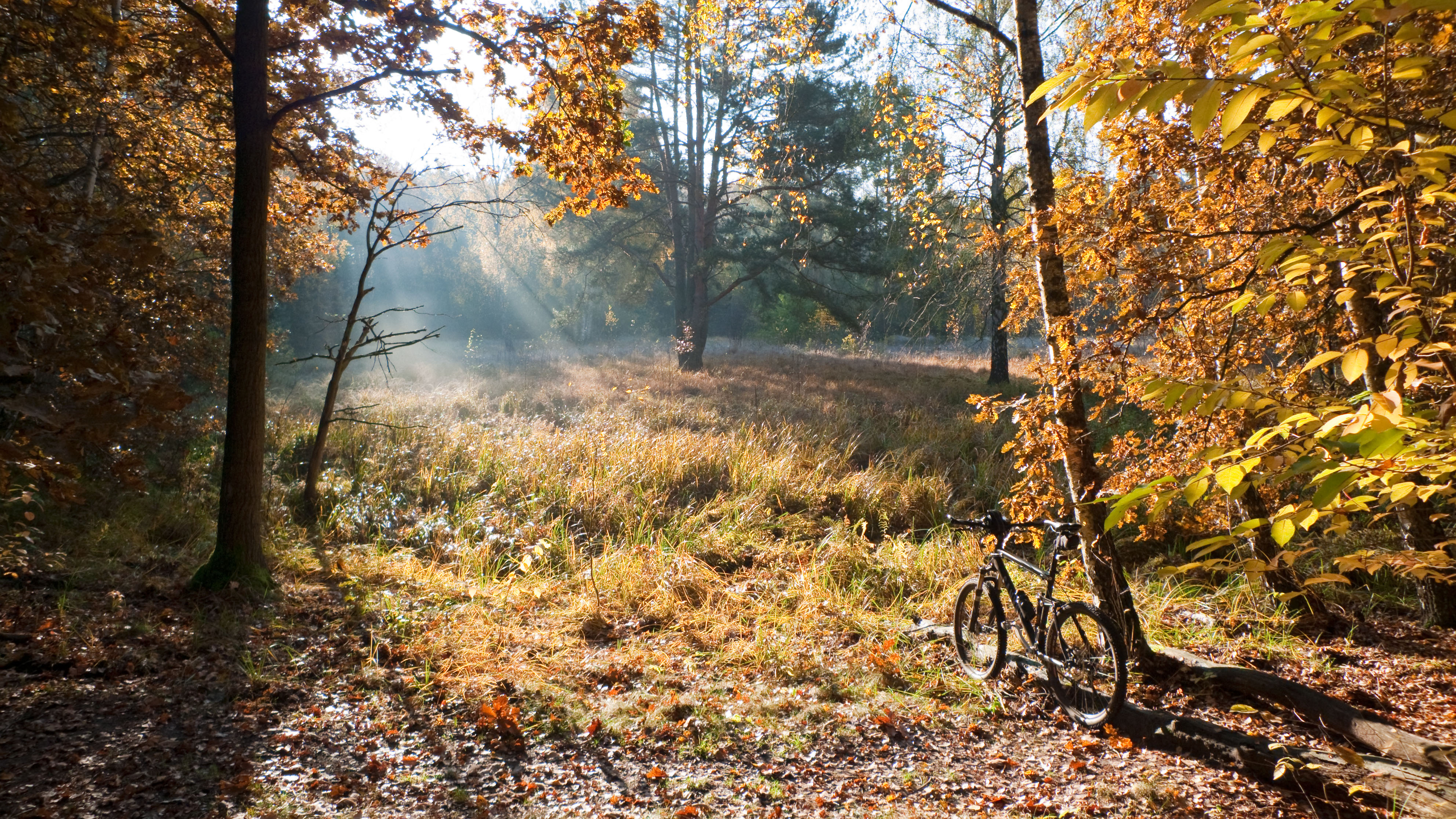 Naturschutzgebiet Krumme Lake, Berlin-Grünau, siehe [1]